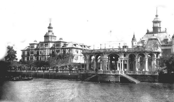 Edificio del Tigre Hotel (izquierda) y el Tigre Club (derecha) a comienzos del siglo XX. El Tigre Hotel fue demolido en la década de 1940, y en el edificio del Tigre Club funciona hoy en día el Museo de Arte de Tigre.